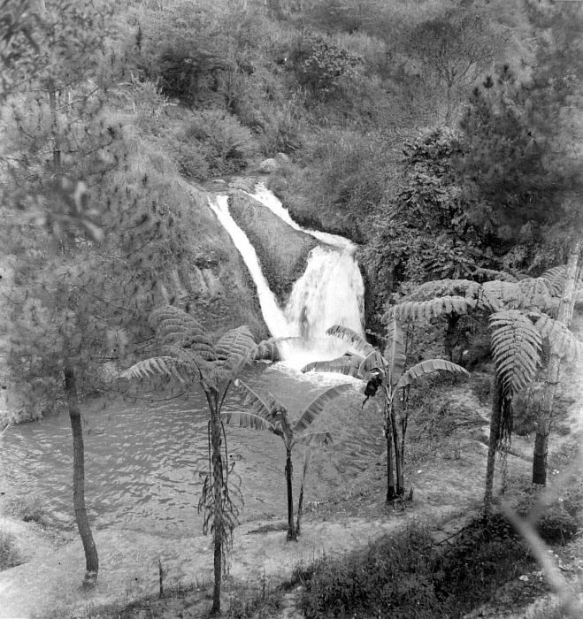 Negatief. De warme bronnen bij de watervallen bij Maribaja, ten oosten van Lembang, West-Java, worden gebruikt voor geneeskrachtige baden